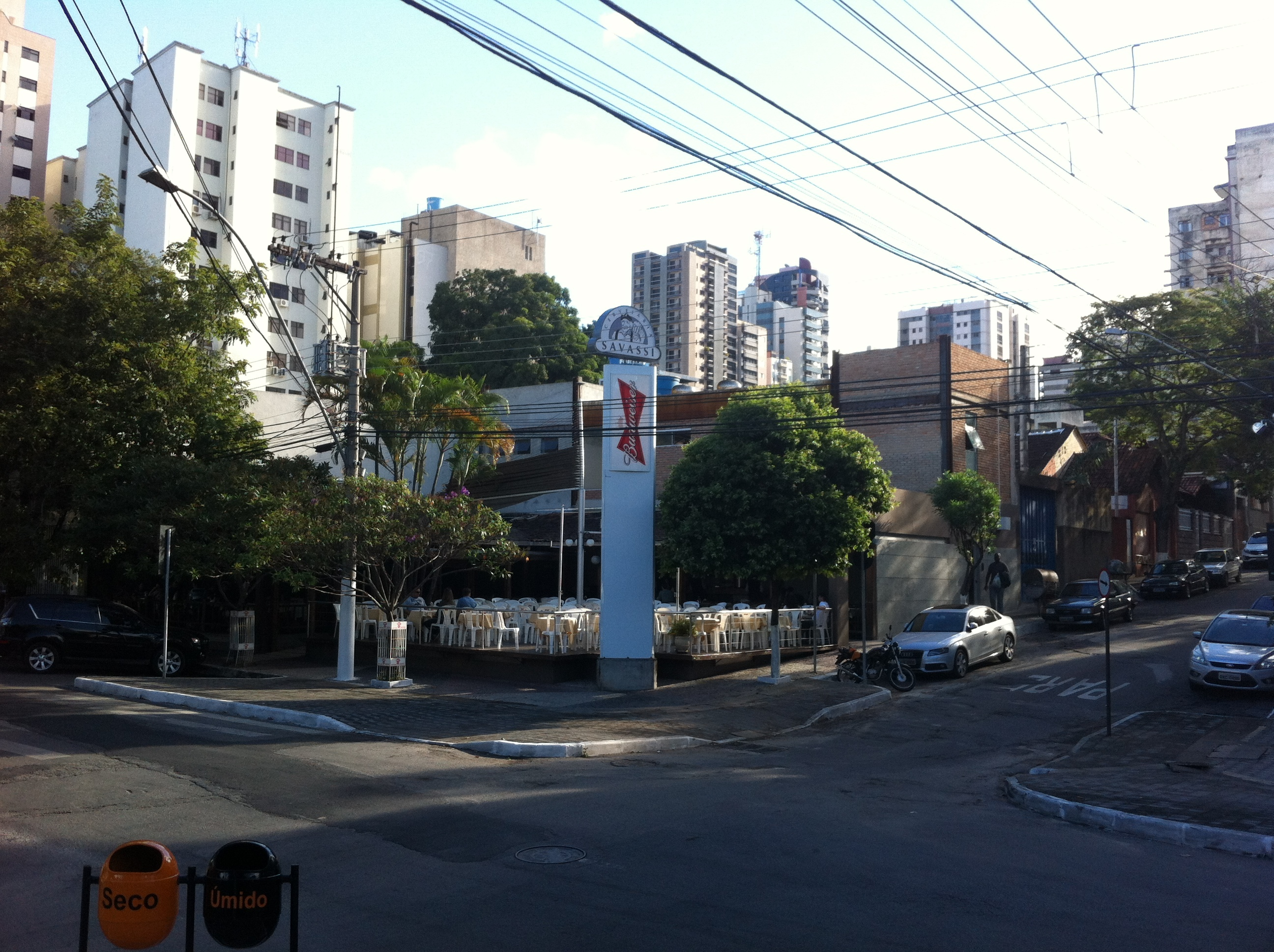 Cervejaria Savassi - Divinópolis